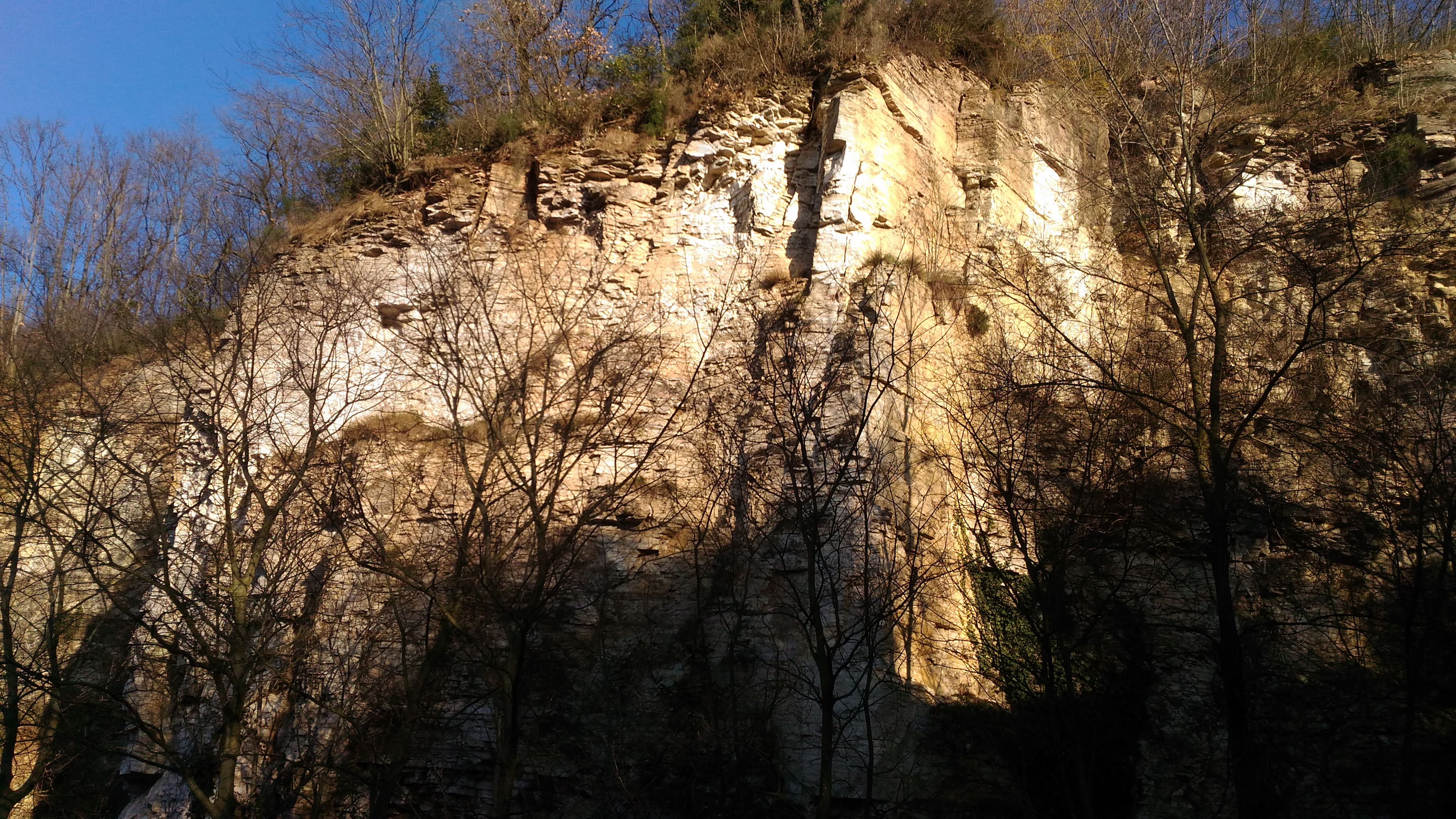 Colli Euganei, formazione rocciosa.